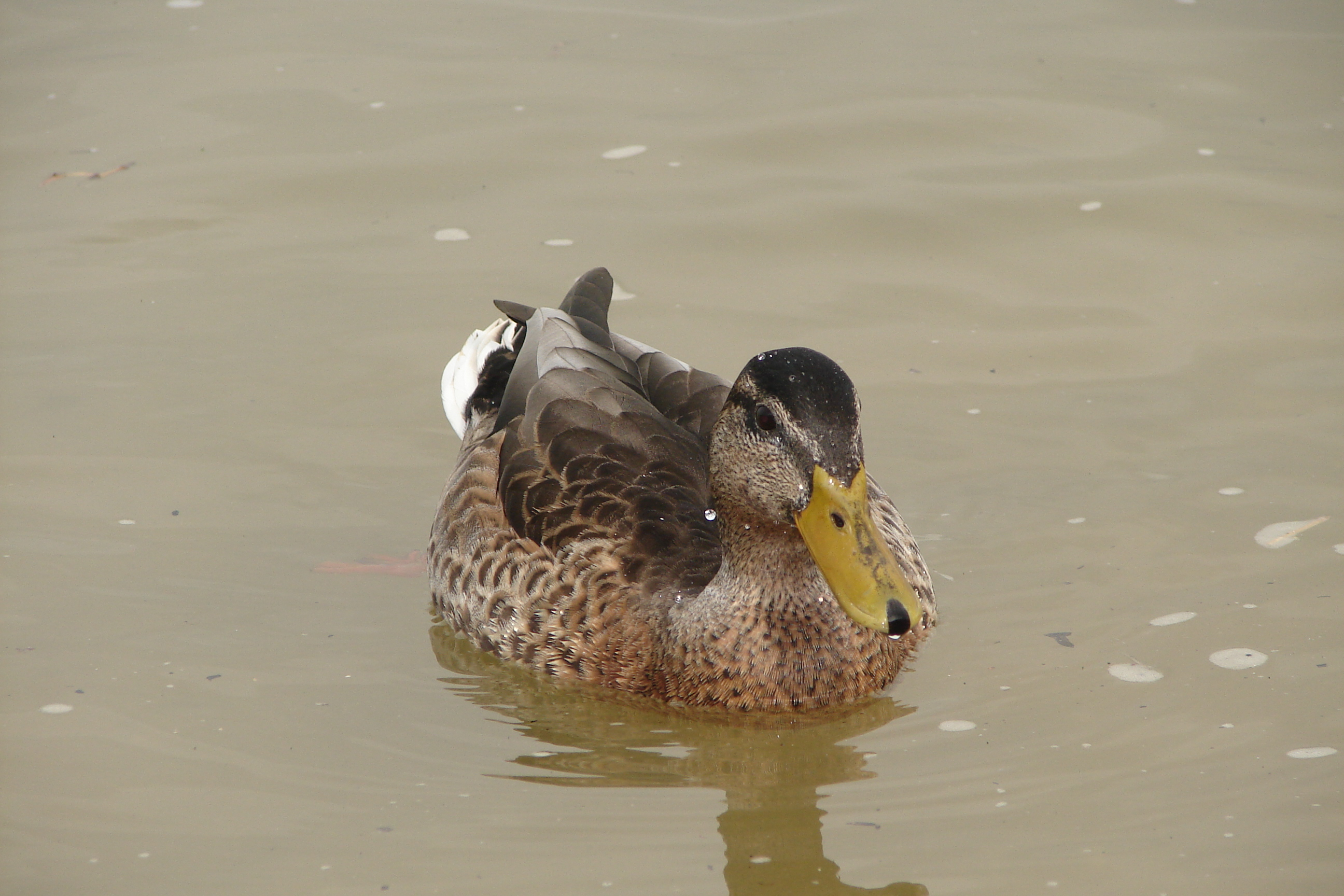 Lieu : Volendam (Hollande) Canard colvert (Mallard)